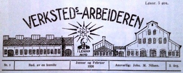 Verksteds-Arbeideren, bedriftsavis utgitt av Norges Kommunistiske Parti, NKP 1926